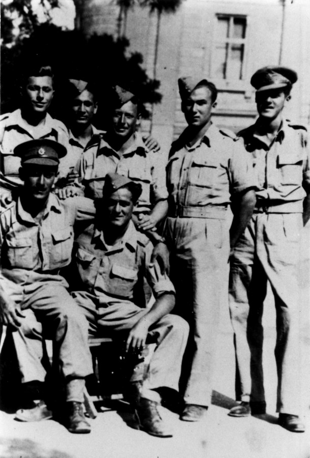 החבורה - איטליה. יוחנן זייד, יוסף קורן, יוסף רוז'יק, אברי גלעד, יעקב קוטב